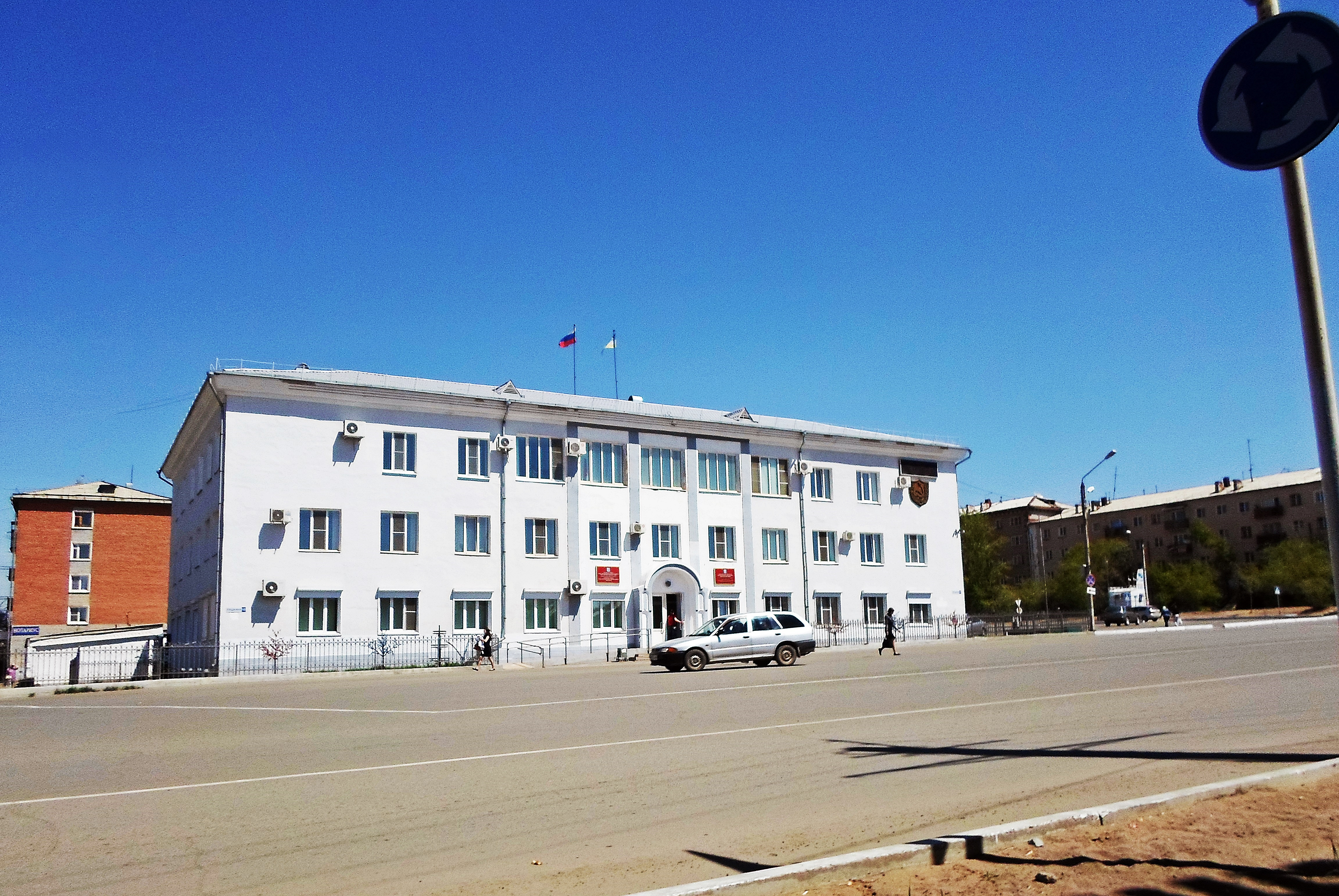 Администрация Селенгинского района Бурятии. Гусиноозёрск, ул. Пушкина, 12.